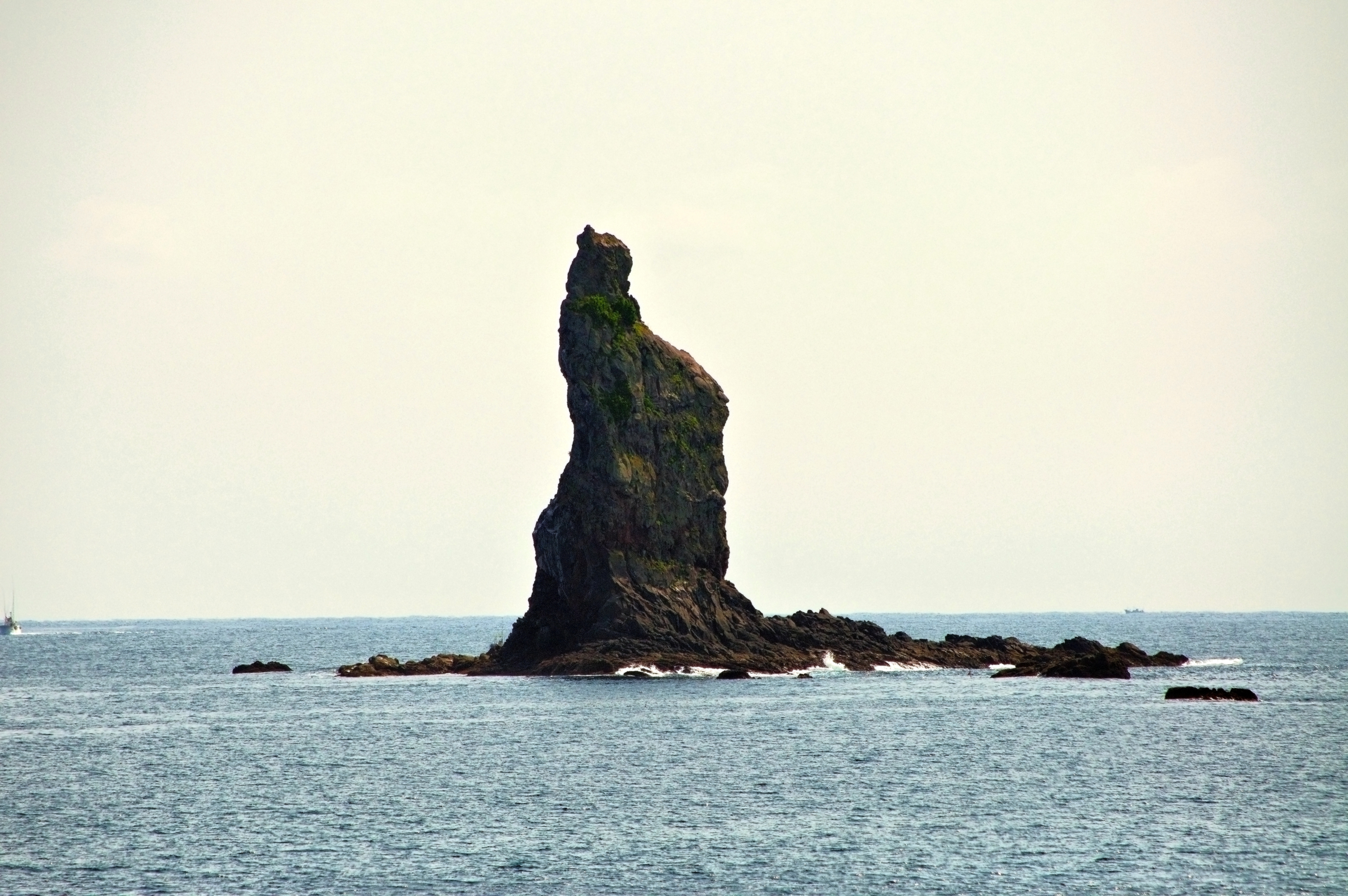 枕崎市立神岩